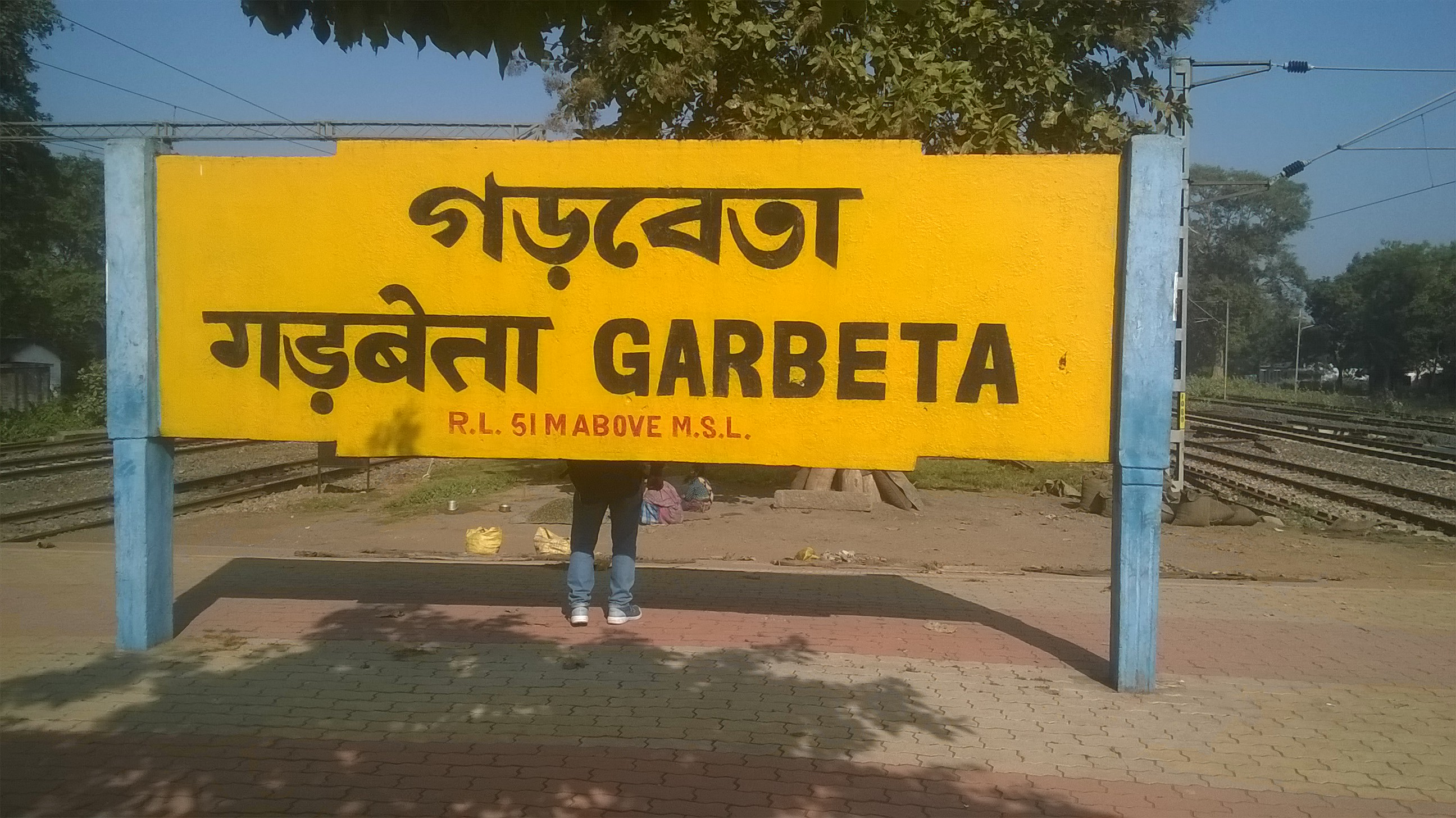 গড়বেতা রেলওয়ে স্টেশন।